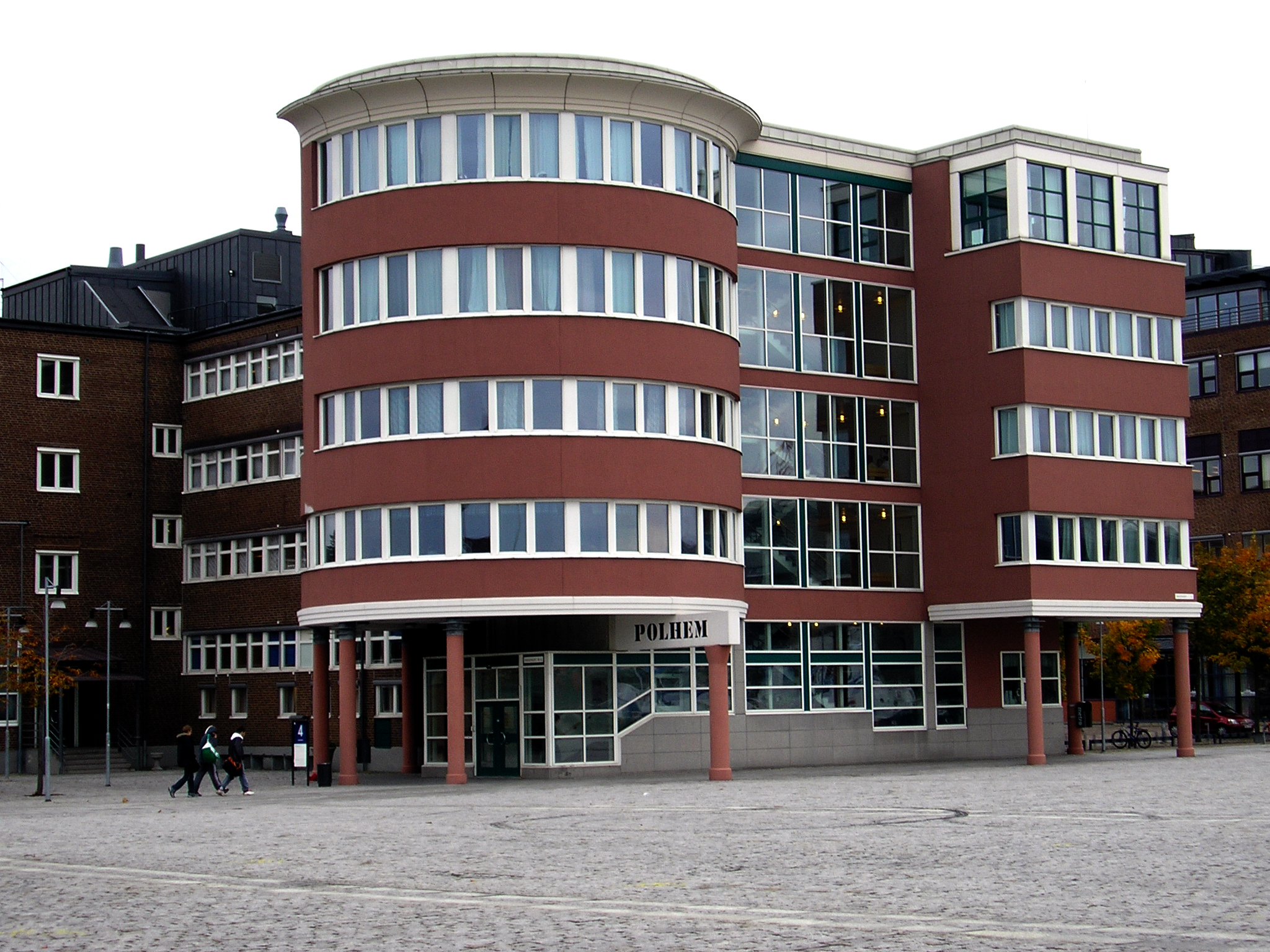 Polhemsgymnasiet